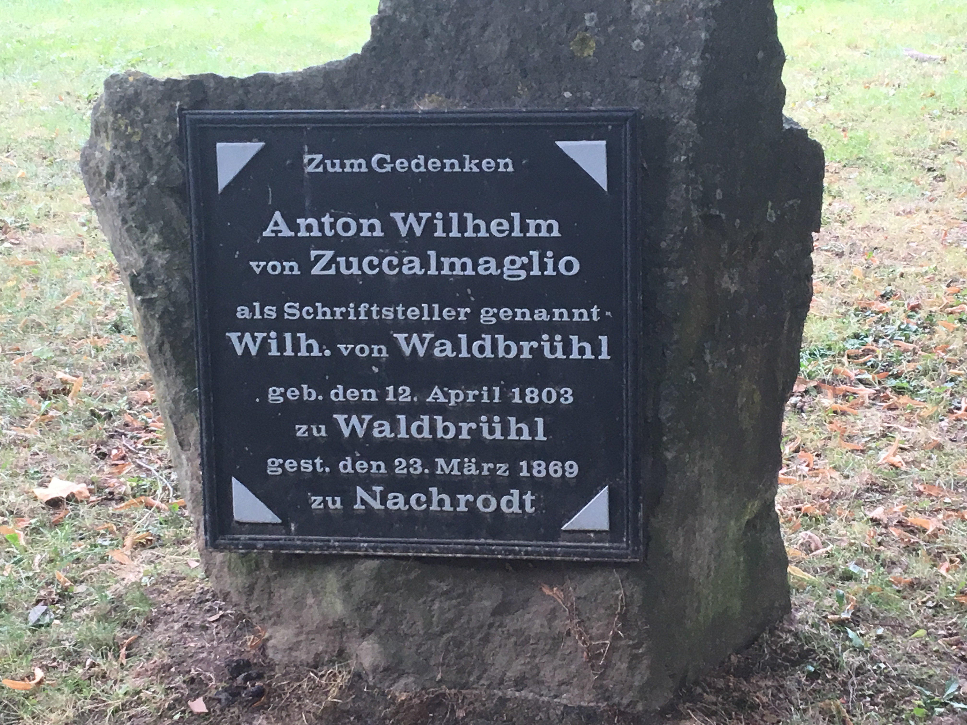 Der Verfasser des Liedes "Kein schöner Land ..."